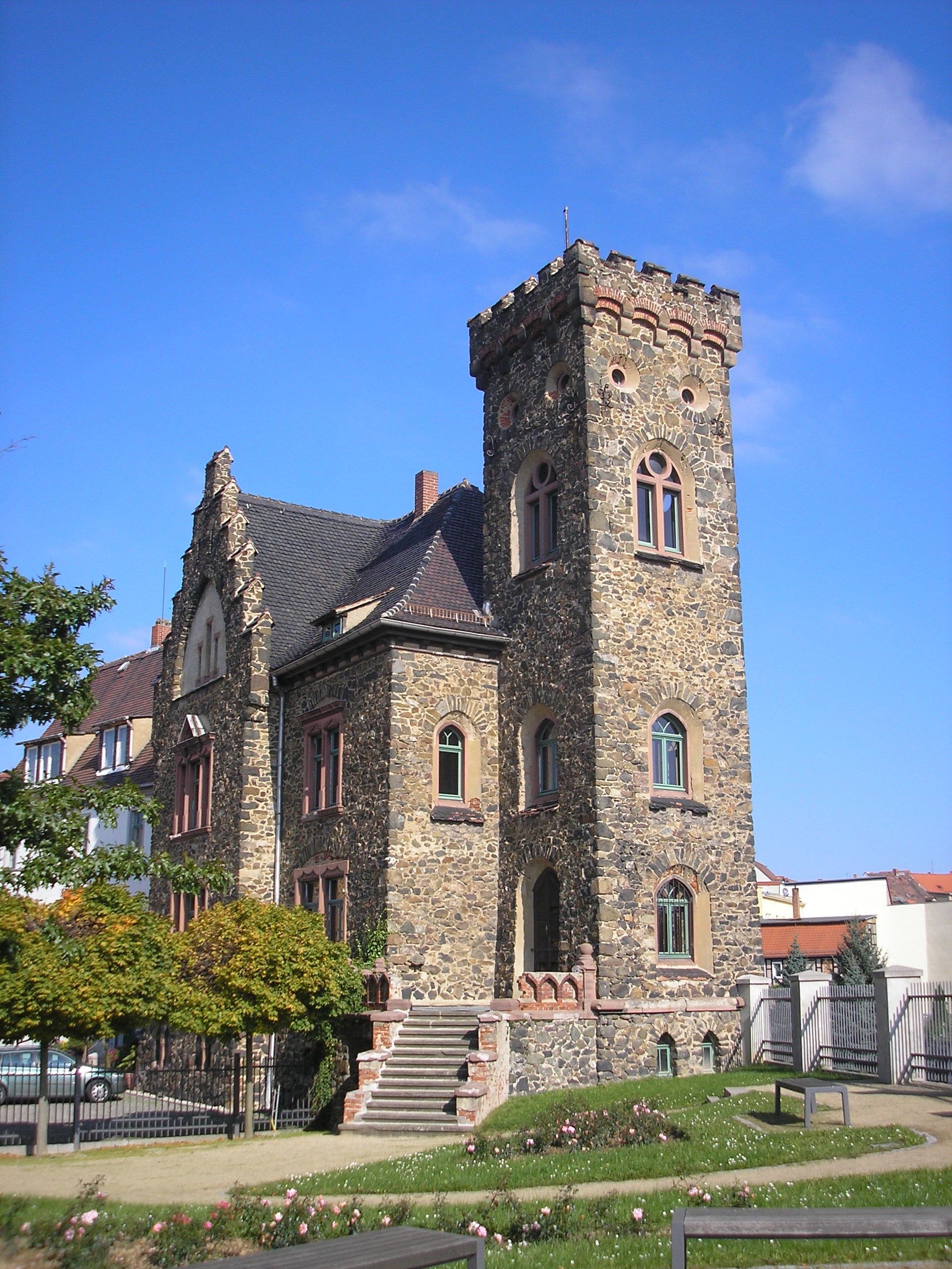 Das Neue Schloss in Ronneburg (Thüringen).